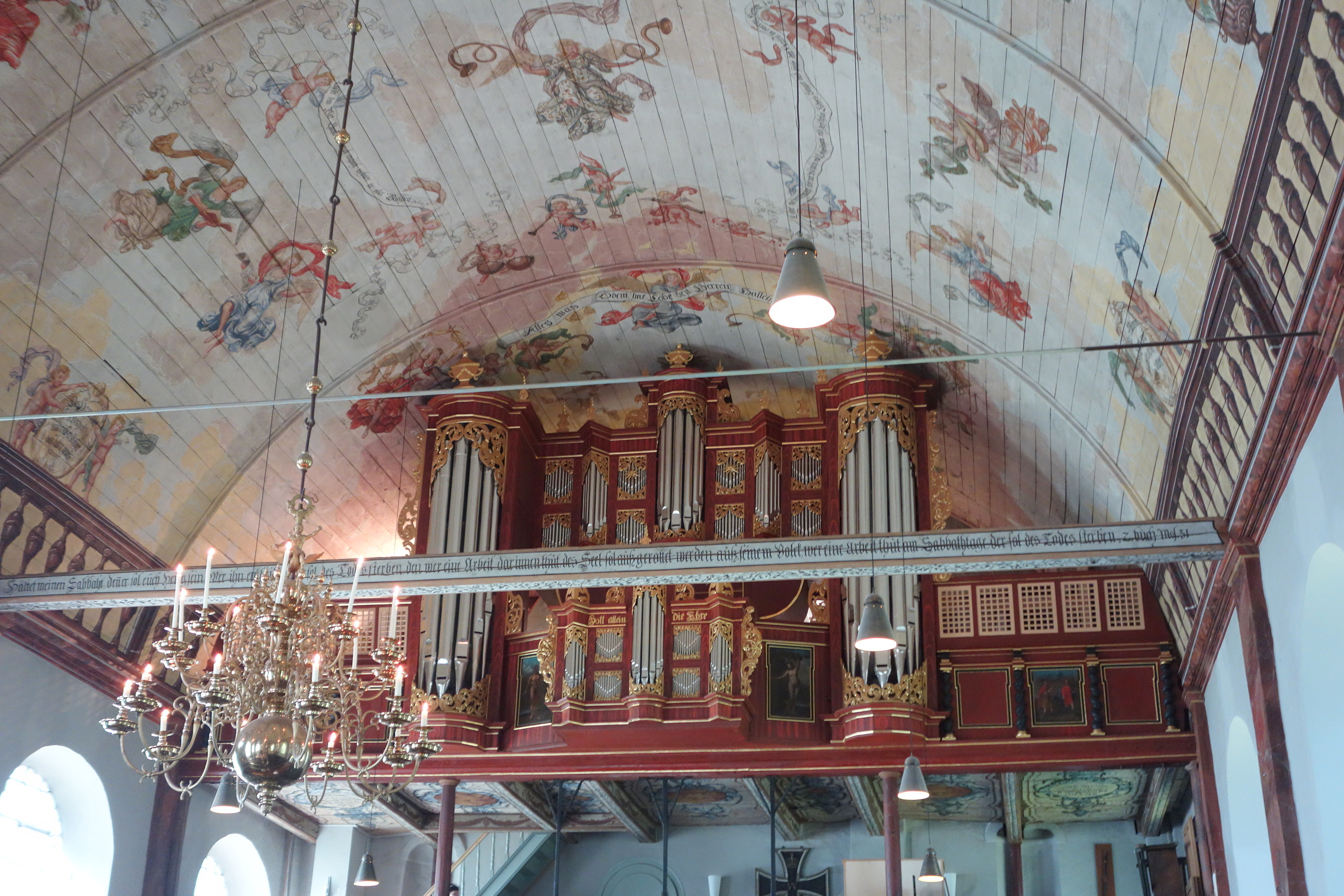 Orgel von St. Pankratius, Hamburg-Neuenfelde, Deutschland